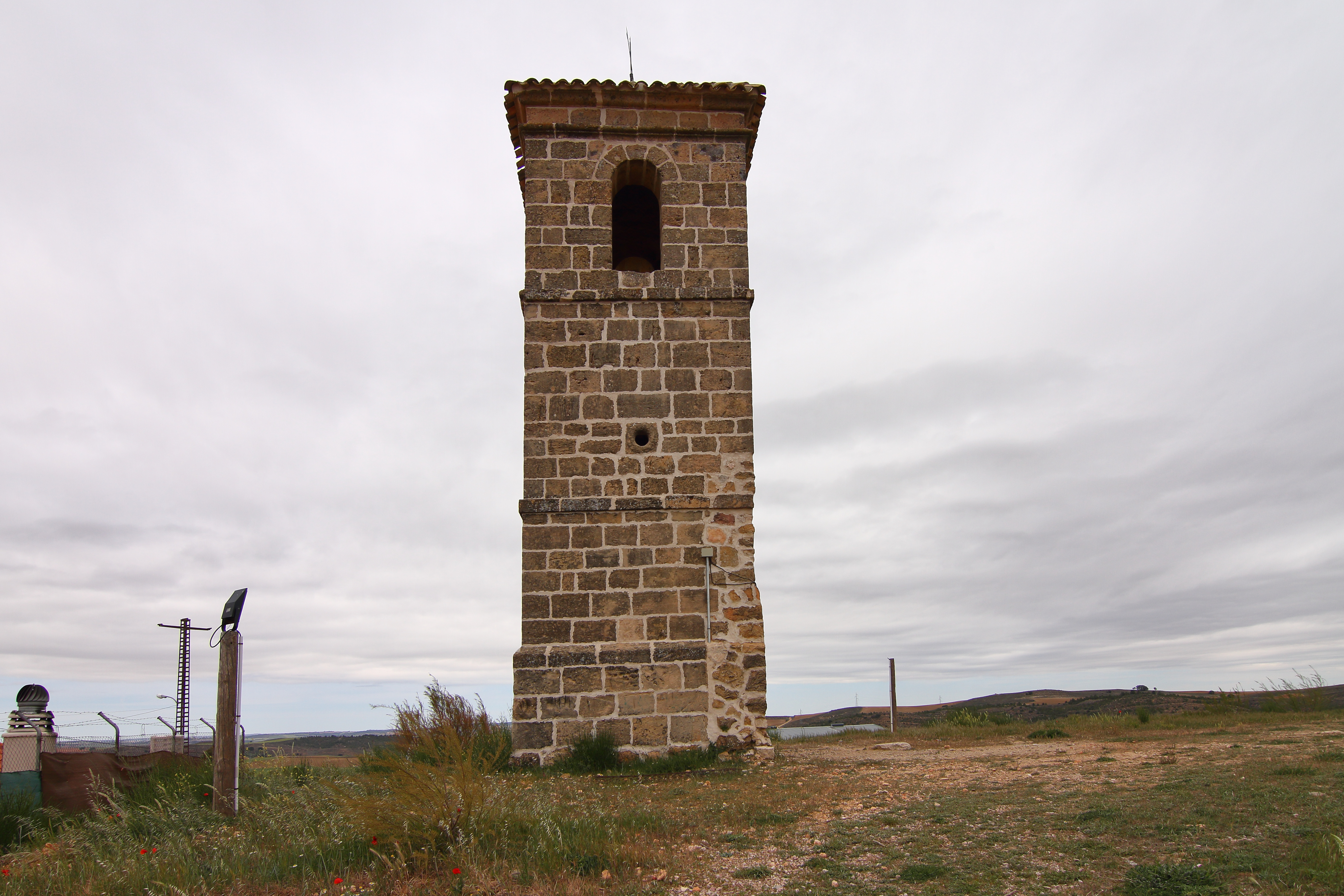 Cervera del Llano, Ermita de San Tiburcio, 01